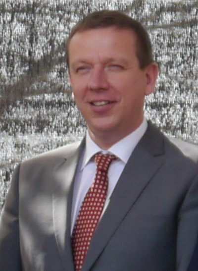 Christian Heinrich-Jaschinski, deutscher Landrat (Elbe Elster Kreis) 2014.